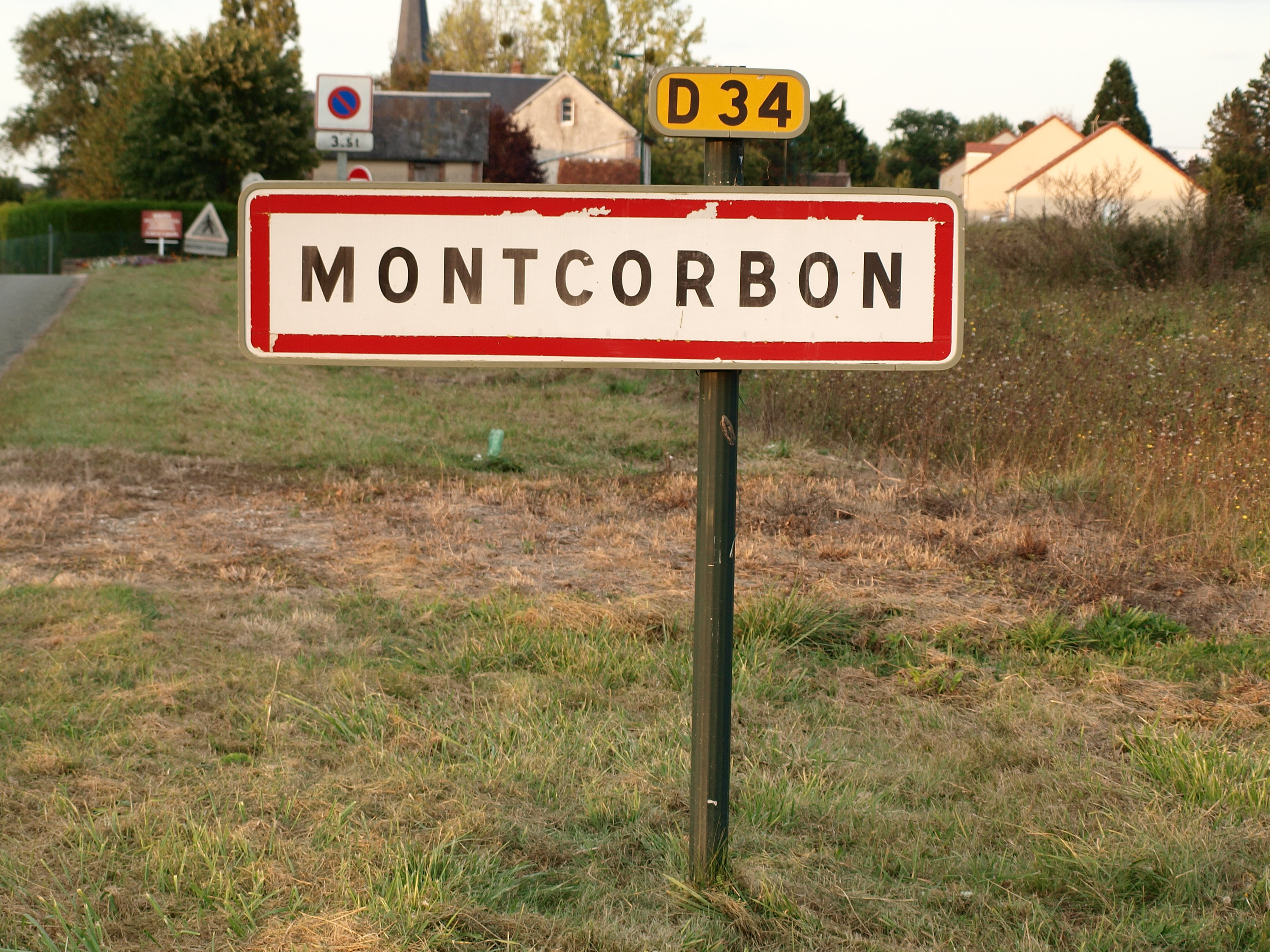 Montcorbon (Loiret, France) ; panneau d'agglomération